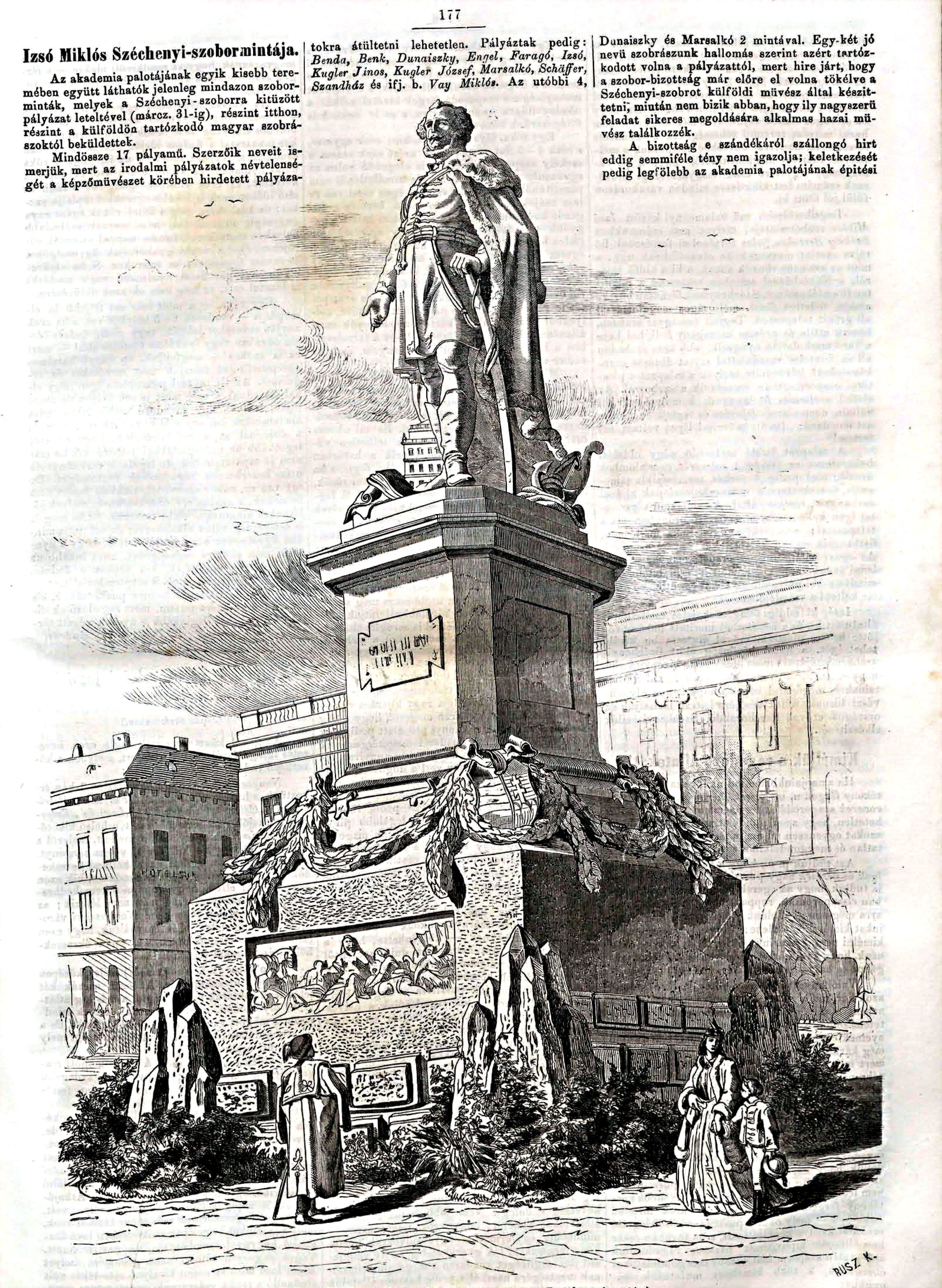 Izsó Miklós Széchenyi-szobormintája Vasárnapi Ujság, 1866. április 15-én